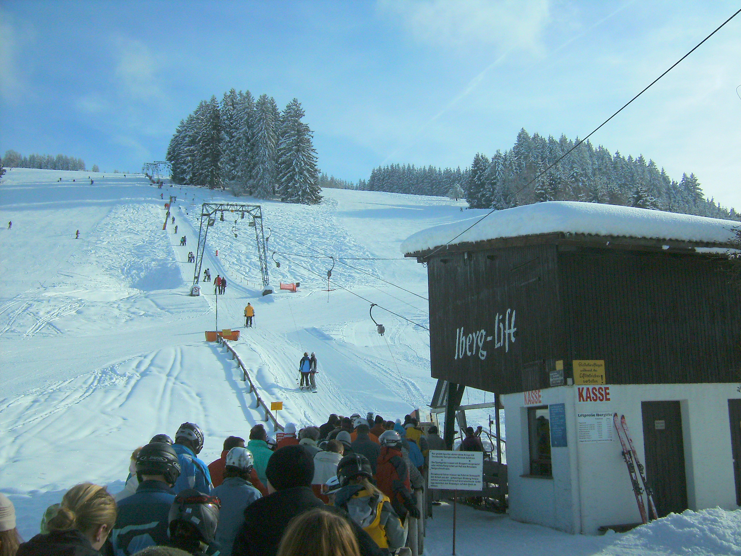 Skilift I-Berg, 2009